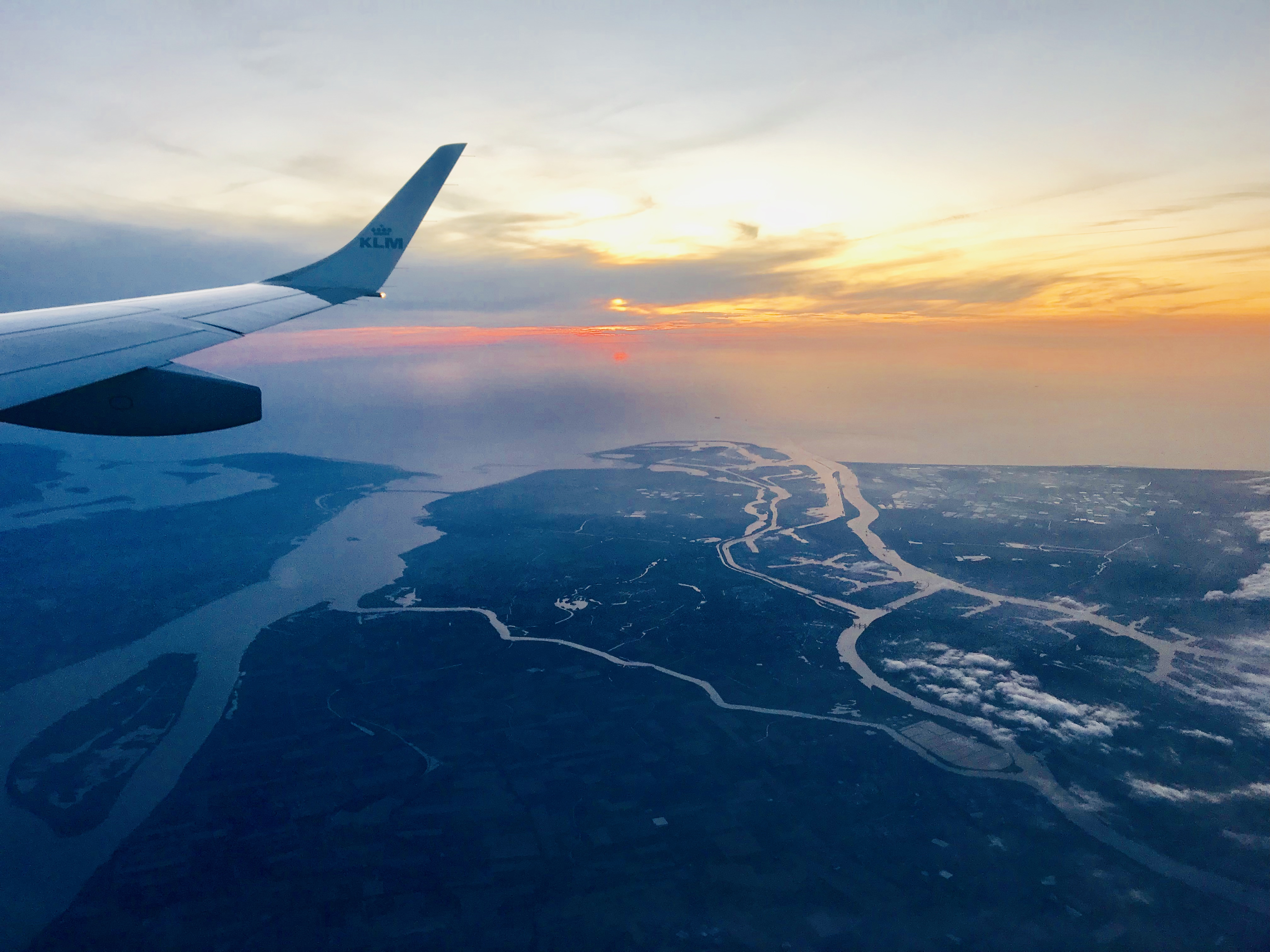 Rheinmündung Rotterdam im Abendlicht